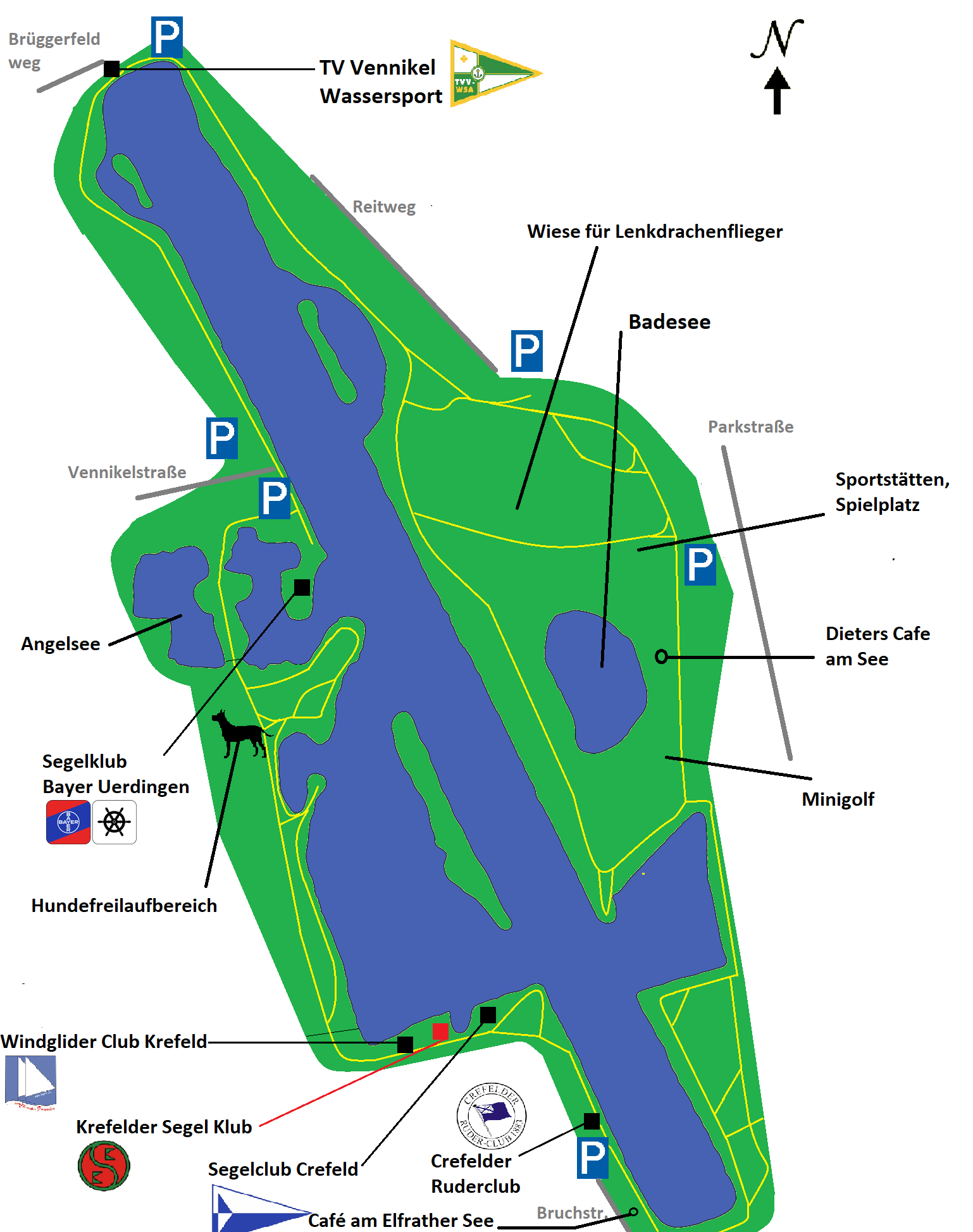 Übersicht Vereine etc.